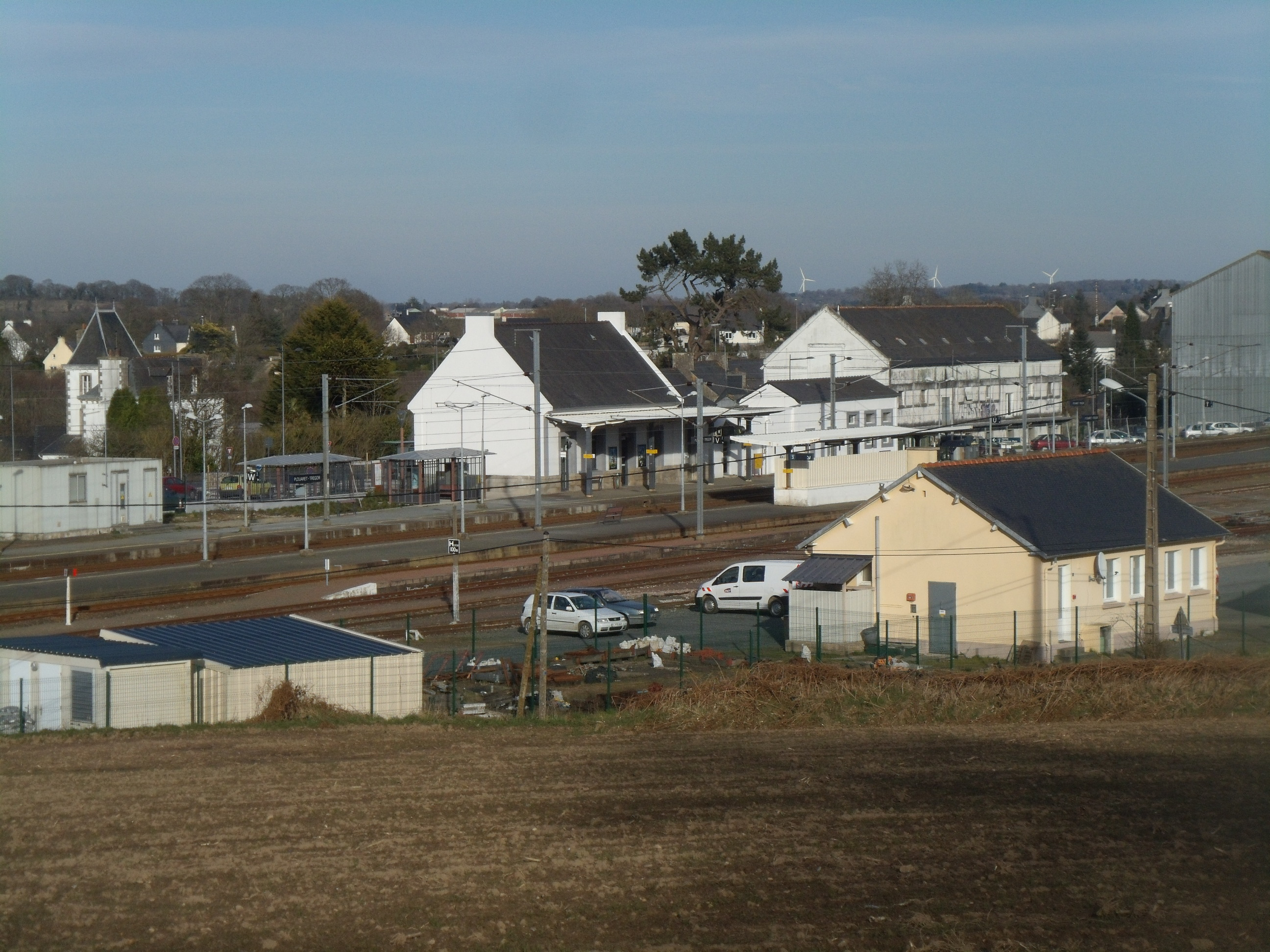 La gare, quais et voies en 2015